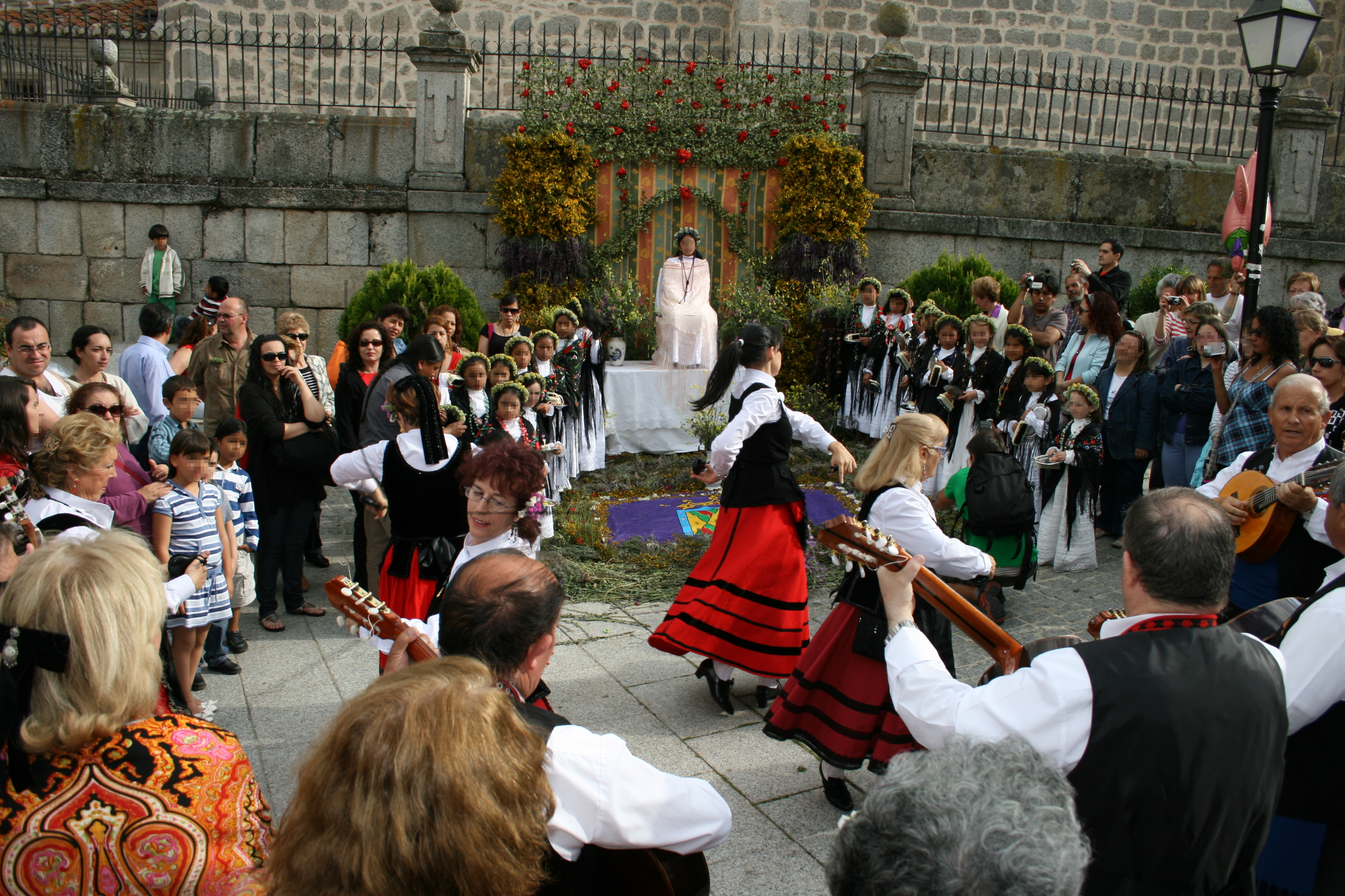 Fiesta de la Maya, 2 de mayo, en Colmenar Viejo, Madrid (España). Declarada de interés turístico regional. Niñas del pueblo exhiben su traje y mantón sentadas inmóviles rodeadas de flores.